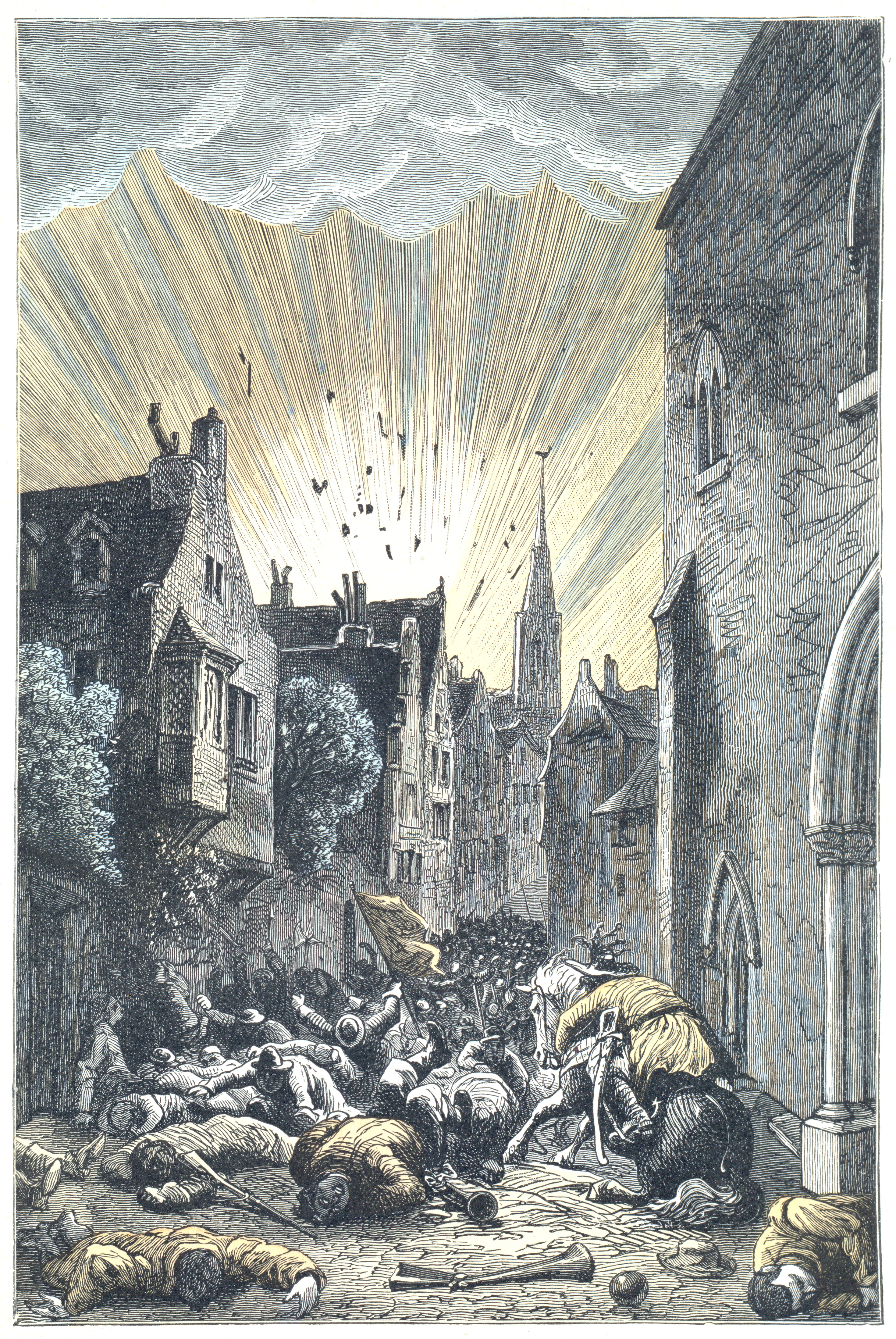 Le Docteur Ox, gravure page non numérotée, 61